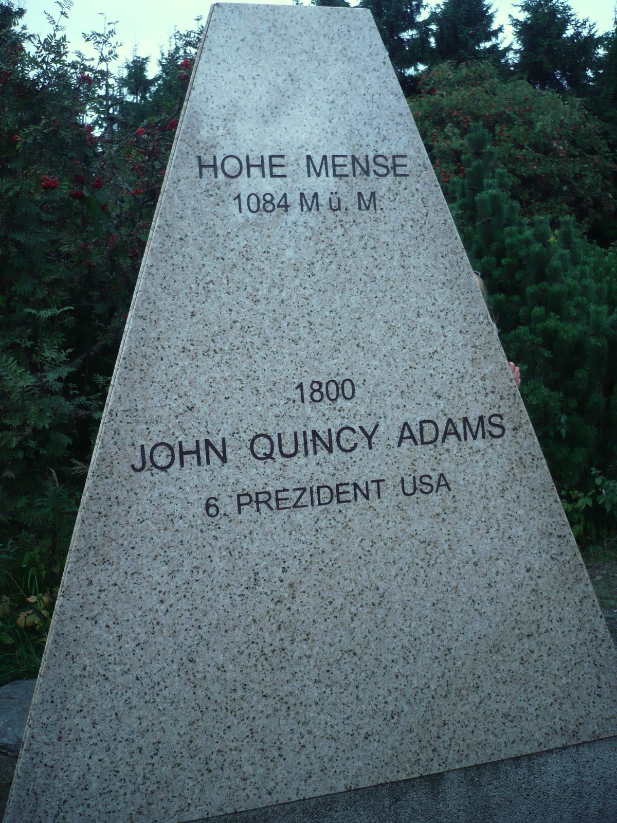 Orlica. Pomnik